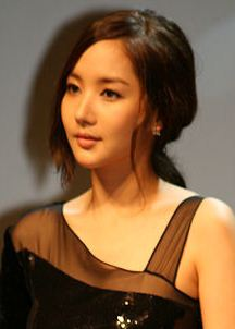 2011년 6월 17일 열린 영화 《고양이: 죽음을 보는 두 개의 눈》 제작보고회에 참석한 박민영.